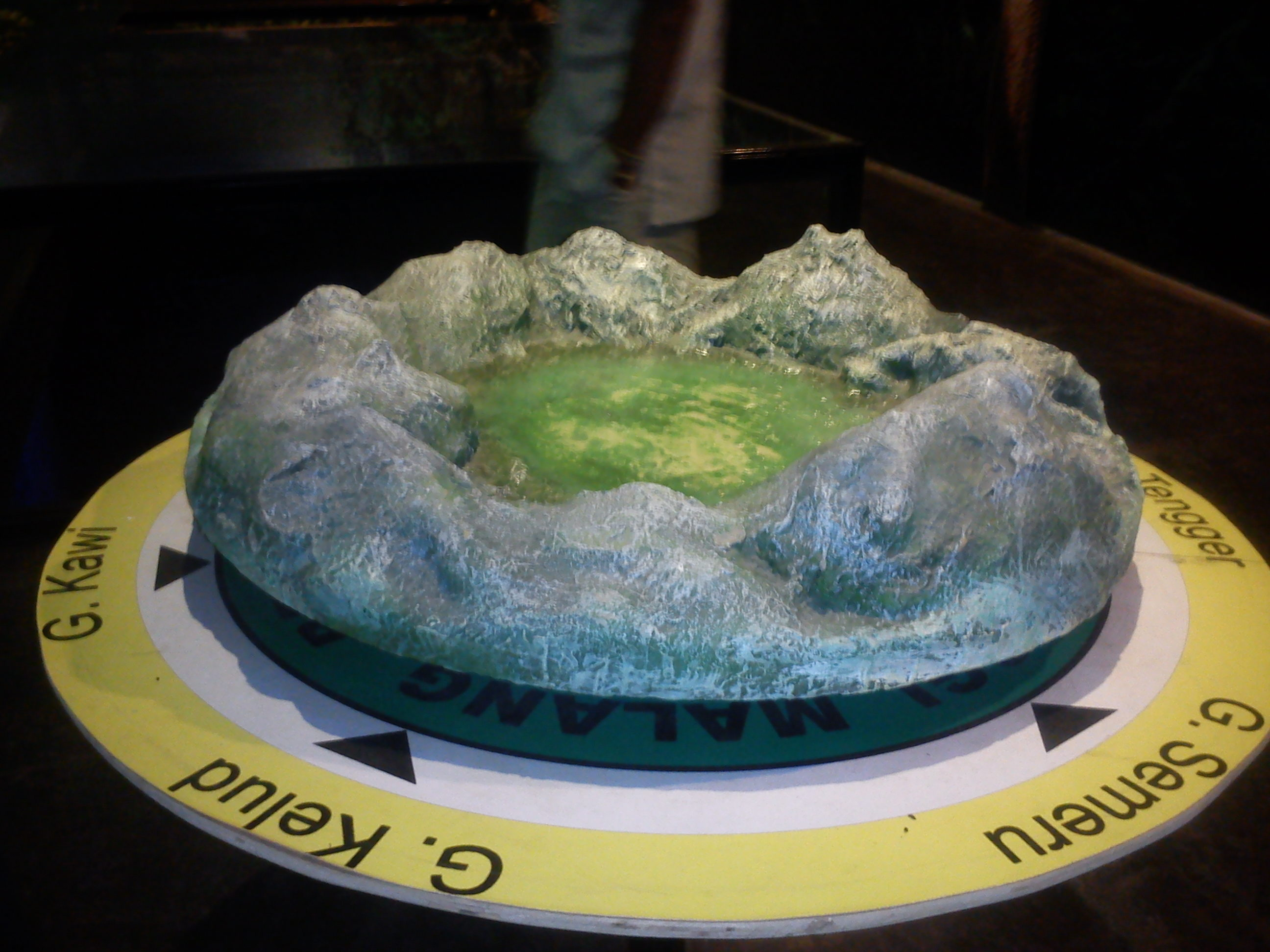 Miniatur Dataran Tinggi Malang